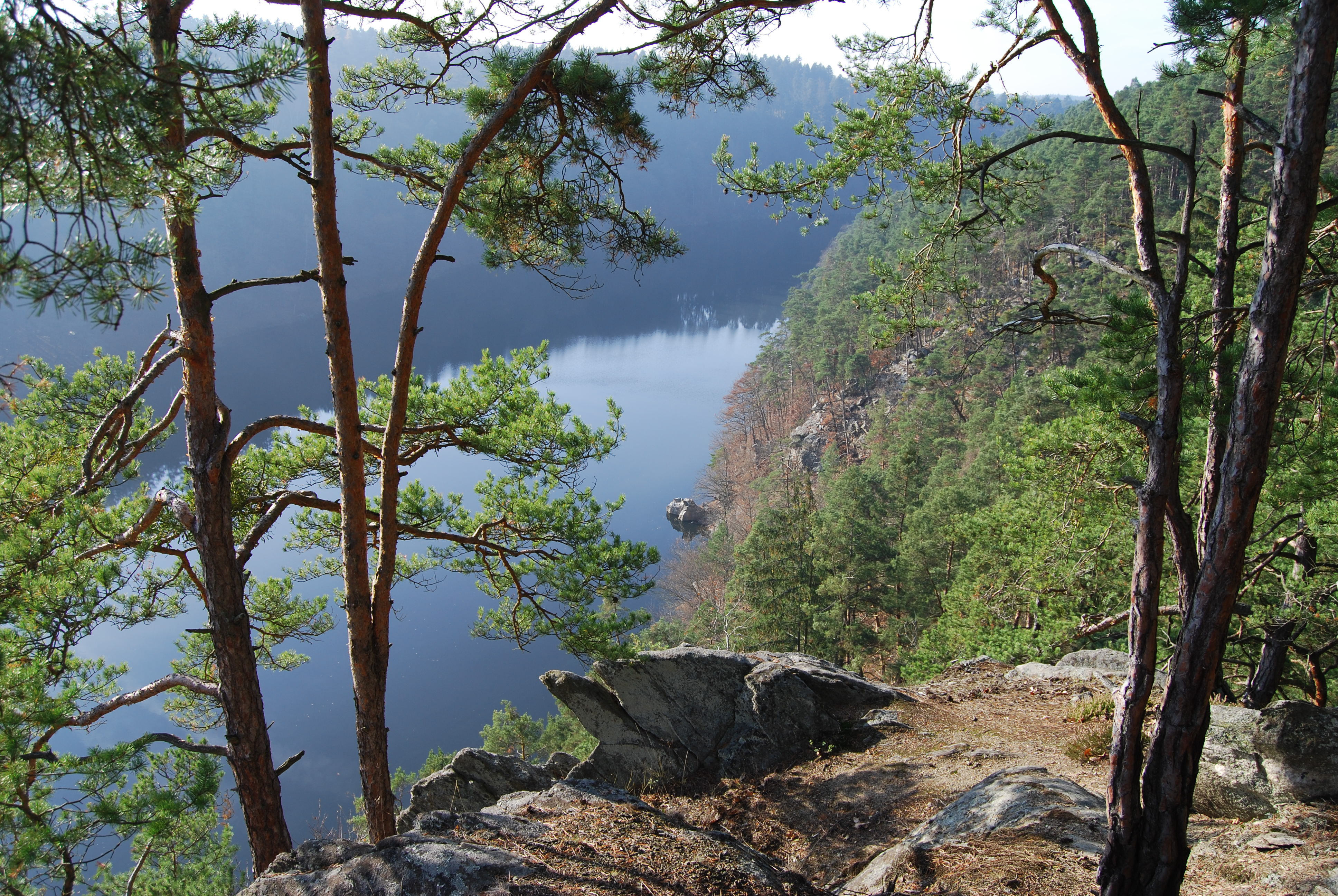 Pohled z vyhlídky. Přírodní rezervace Výří skály u Oslova, nedaleko obce Tukleky. Okres Písek. Česko.